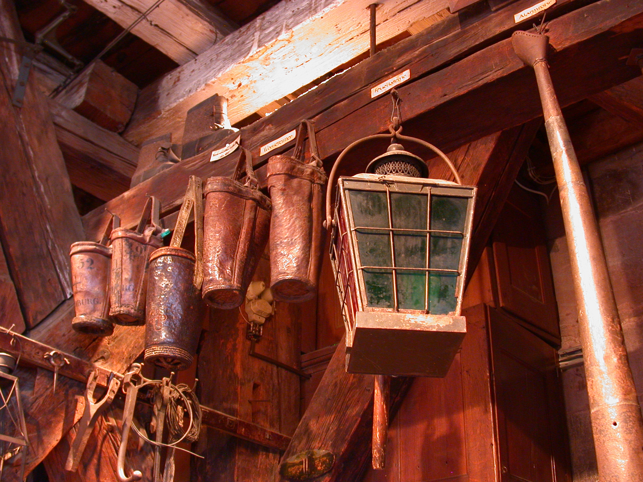 Alte Feuerwehrausrüstung des Münsters (von links nach rechts: Eimer, Laterne, Signalrohr)